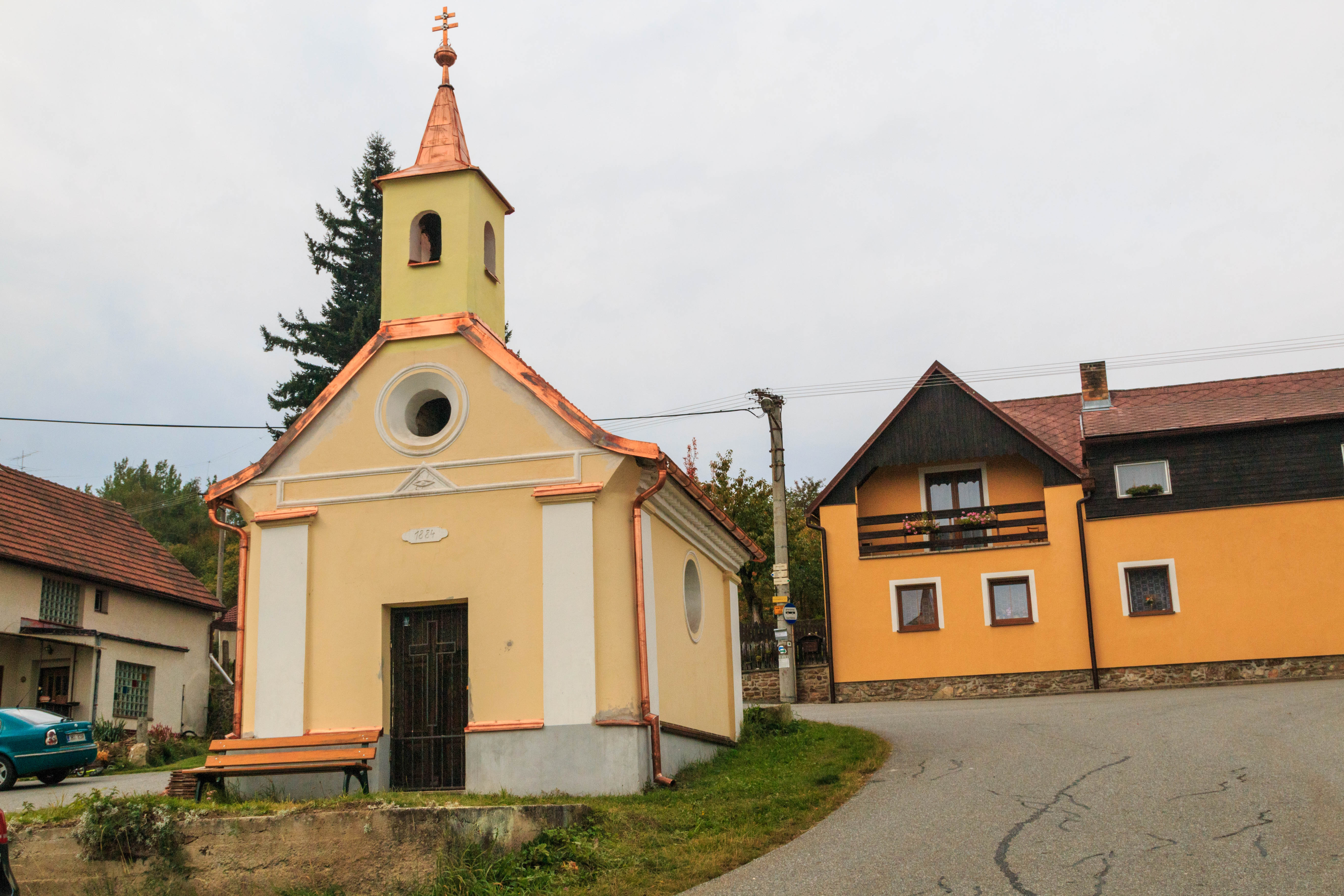 Dolní Kožlí - kaple